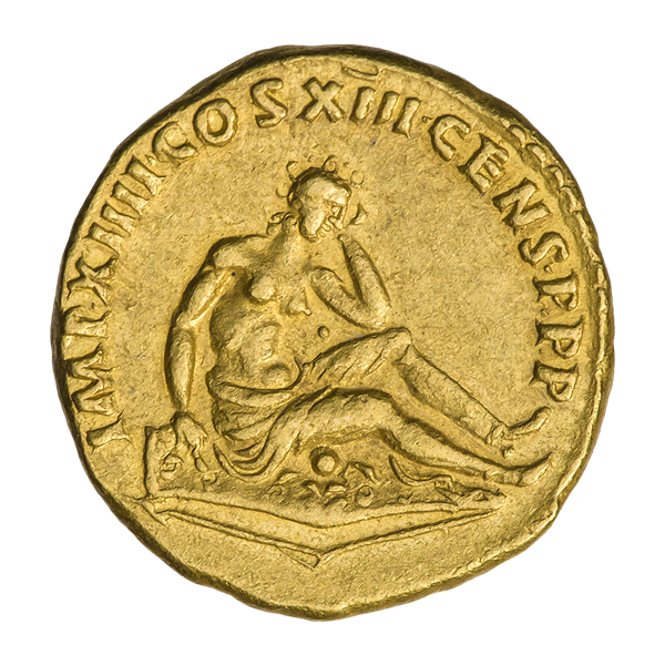 Ауреус. Домициан. Ок. 87 г. (реверс). Надпись IMP XIIII COS XIII CENS PPP. Германия (персонификация территорий, заселенных германцами) сидит на щите, вправо; рядом сломанное копьё.